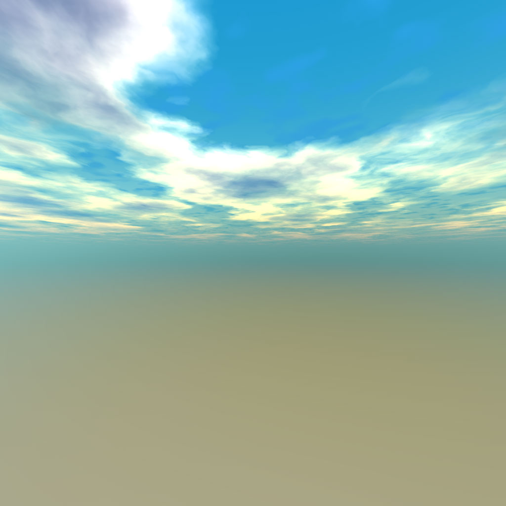 een skybox texture free